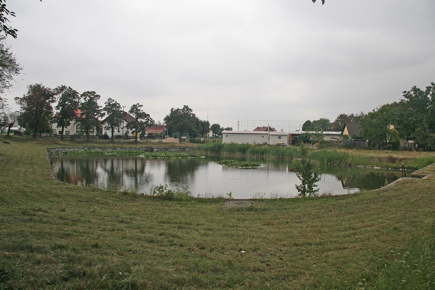 Staré Ždánice - kostel svatého Václava, okres Pardubice